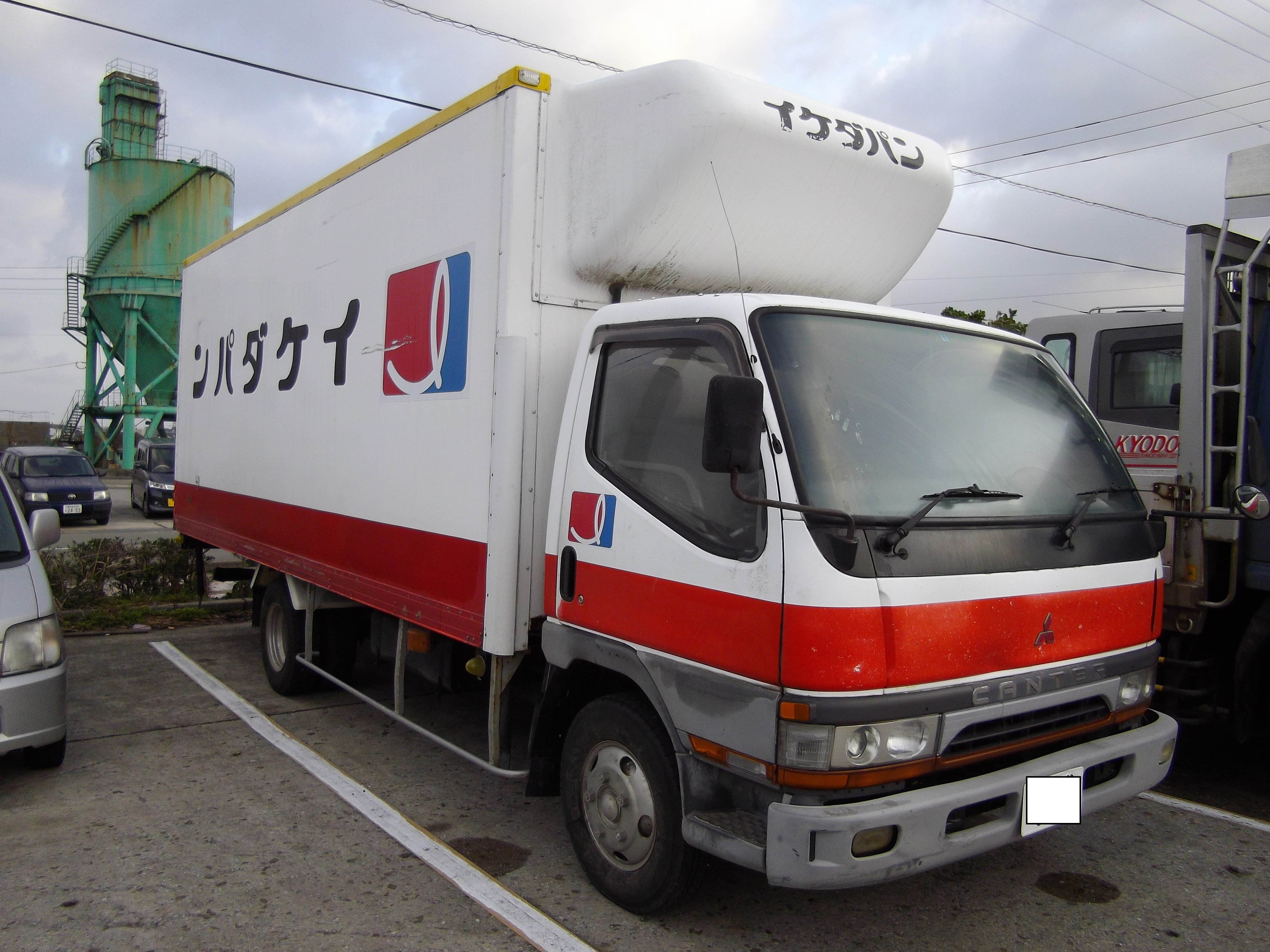 池田パントラック